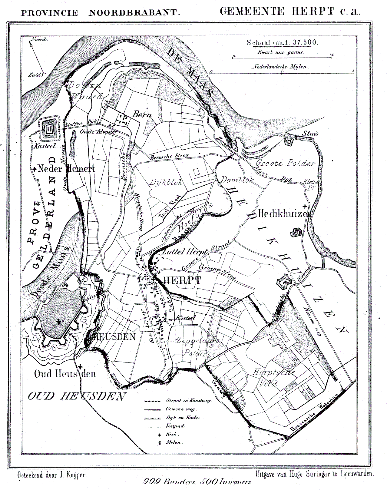 Nederland, Noord-Brabant, Gemeente herpt